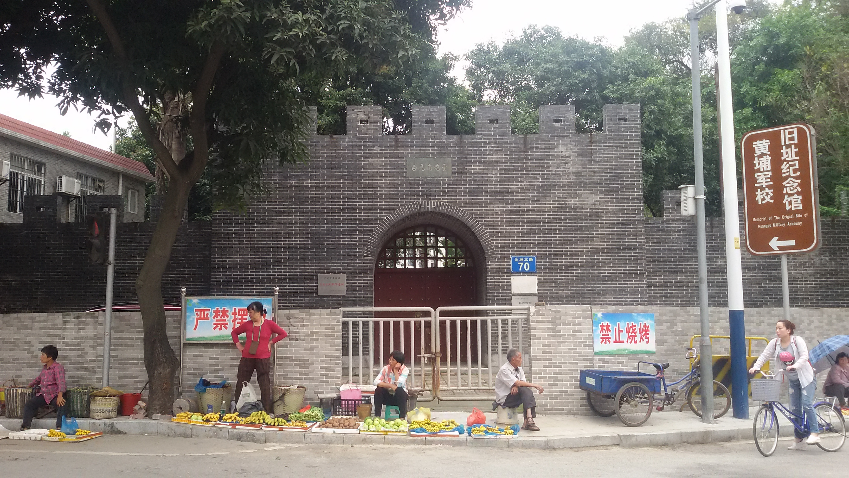 粵語: 喺黃埔區嘅長洲砲臺